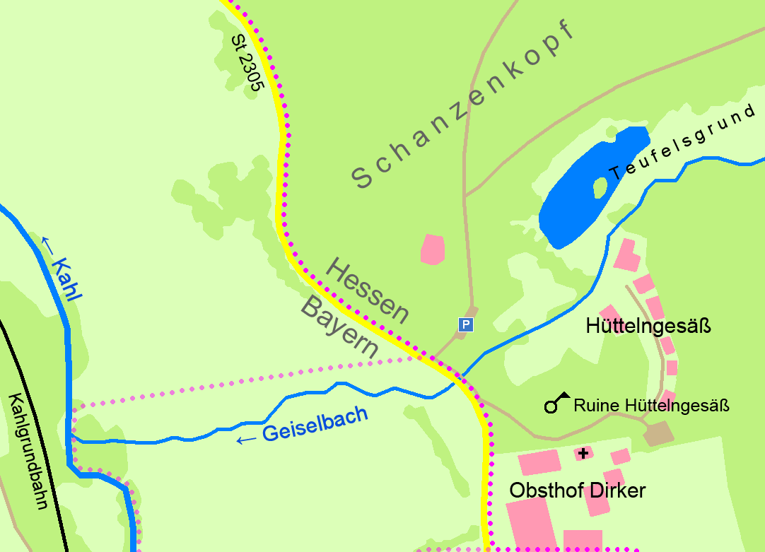 Karte von Hüttelngesäß Siedlungsfläche Wald Grünfläche Gewässer Parkplatz Kapelle Ruine Staatsstraße Wald- und Feldweg Landesgrenze Landesgrenze bis 2011